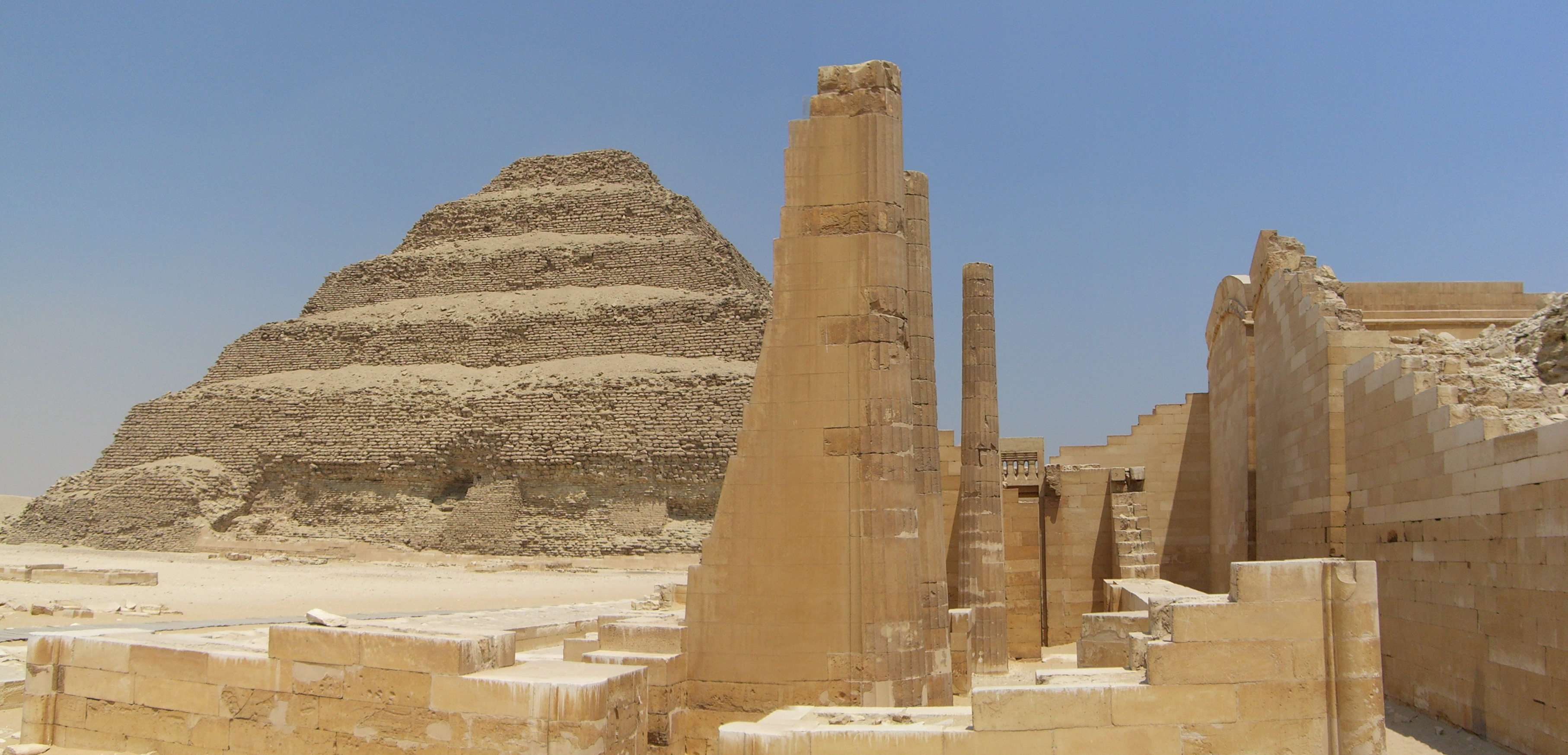 Vue sur le temple "T" et la cour sud du complexe pyramidal de Djéser à Saqqarah - IIIe dynastie égyptienne